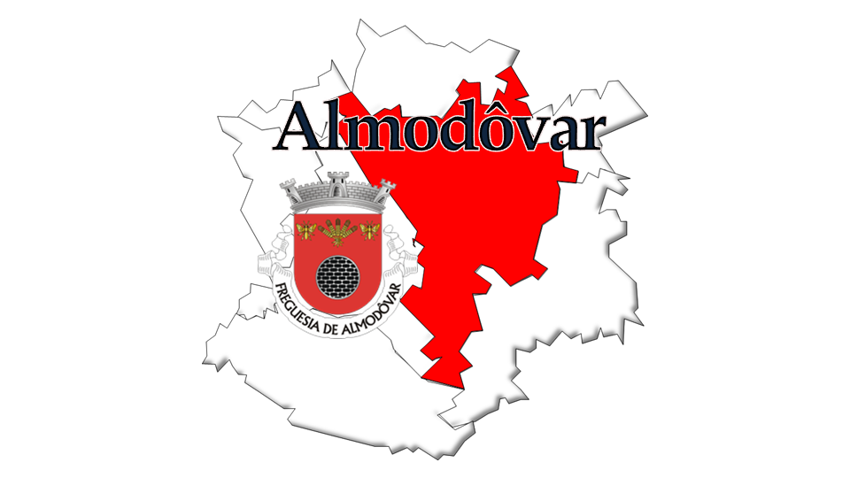 Evolução da População